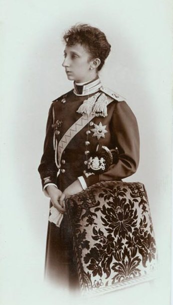 Marie Louise von Parma Fotografie ca. 1890